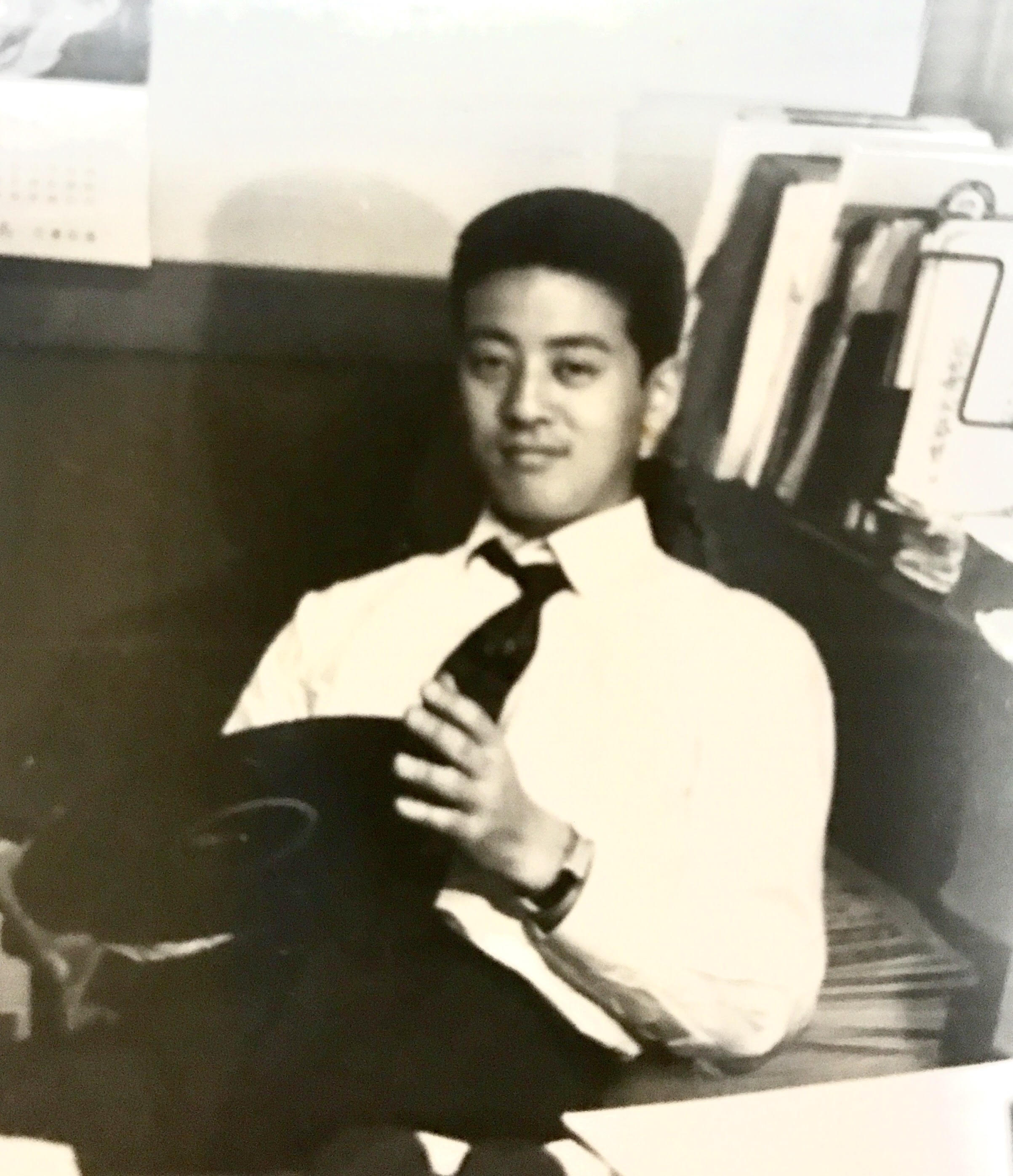 西久保弘光の本人写真（20代）